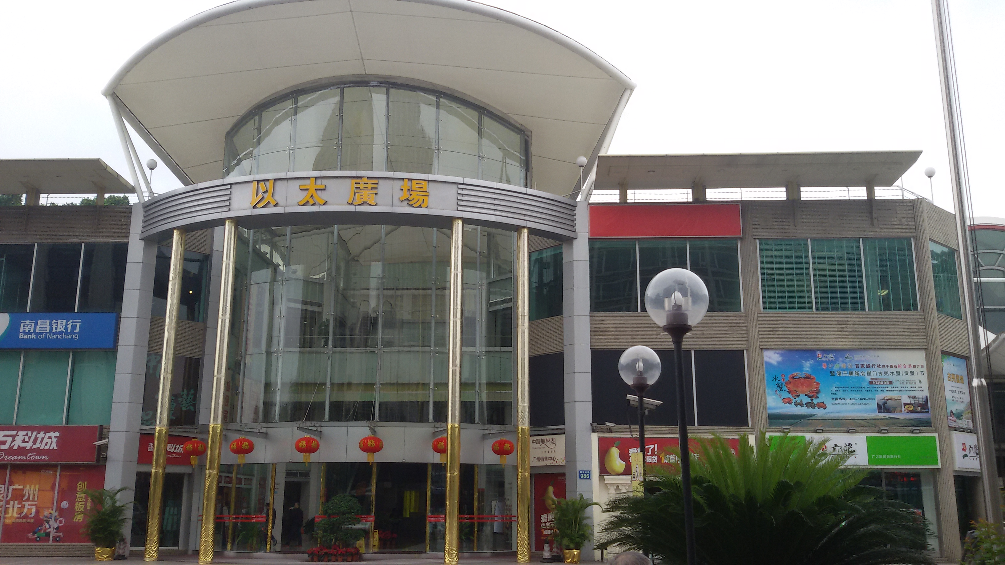 粵語: 以太廣場